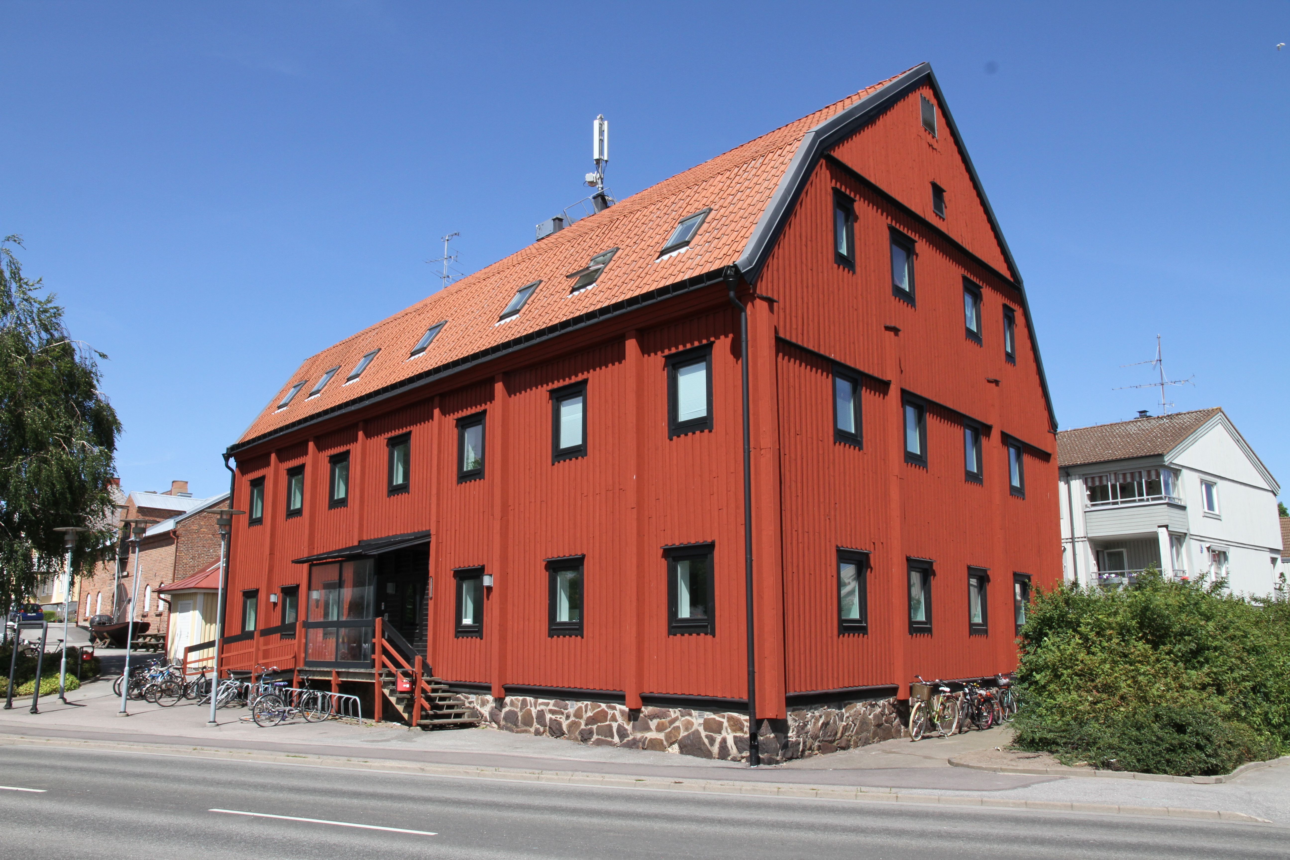 Drottninggatan 3, Karlshamn 17 juli 2015